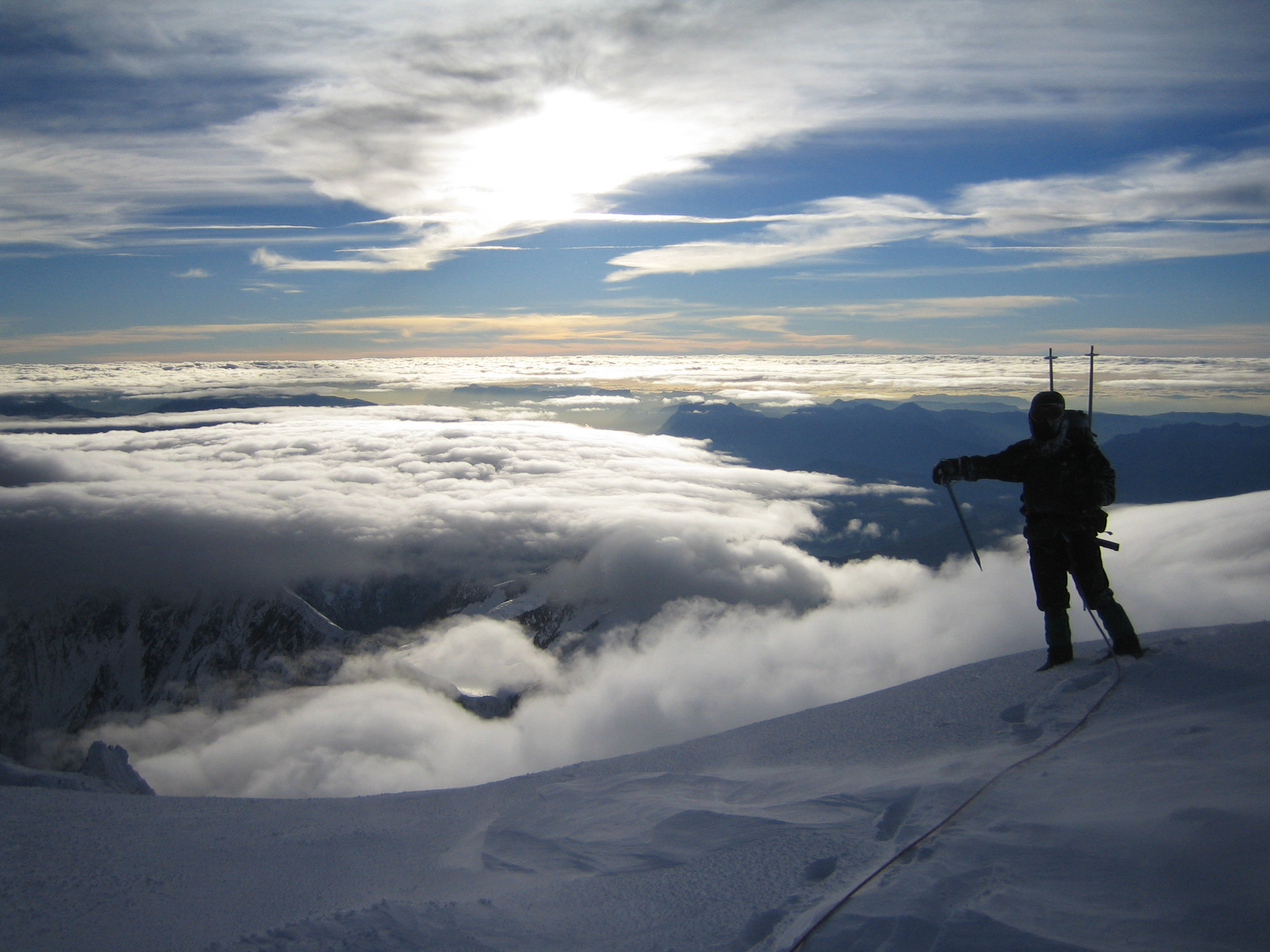 éclaircie fugace lors de la redescente du mont blanc